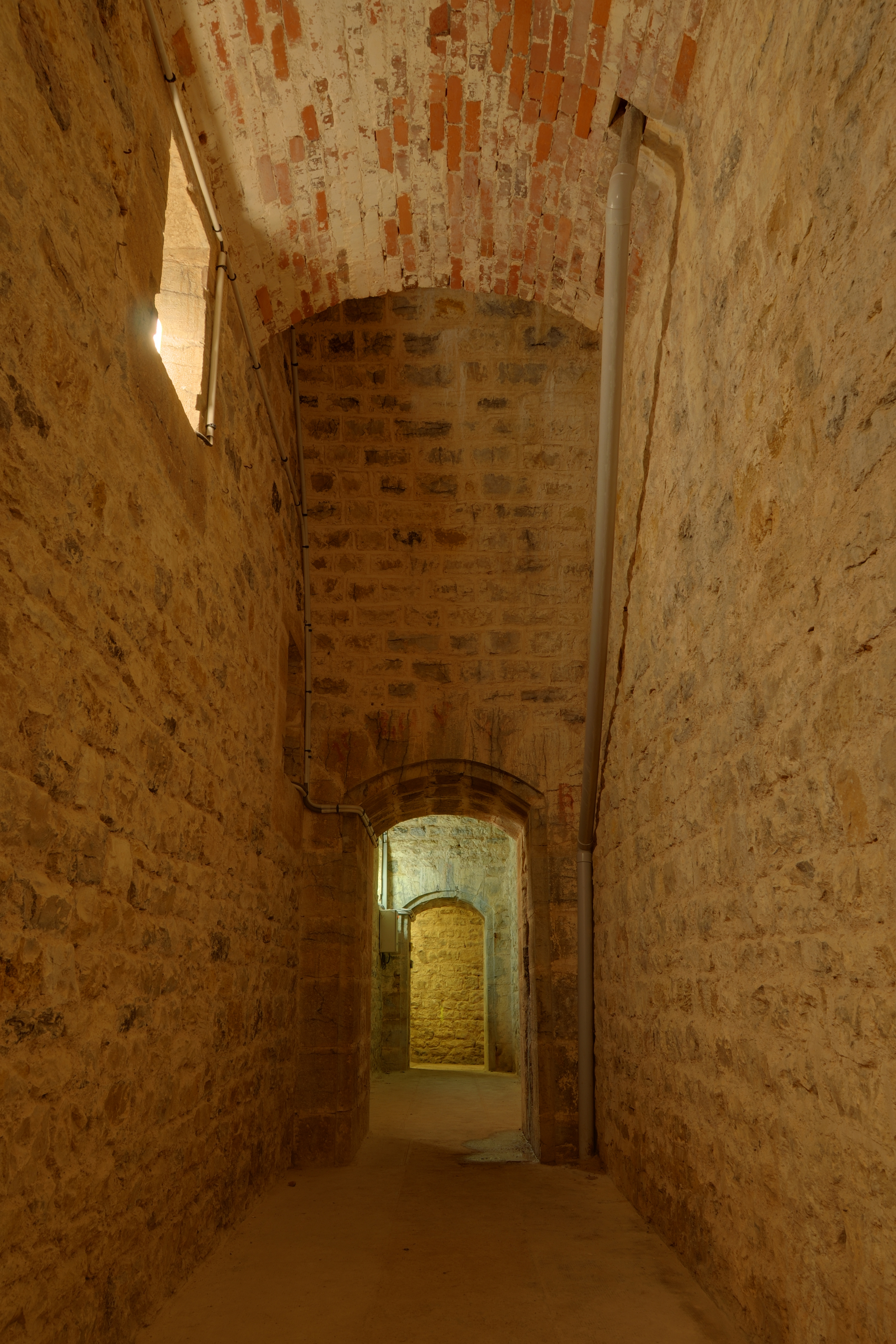 La chambre des lampes d'un des magasins à poudre. Bart hill fortifications (HDR).